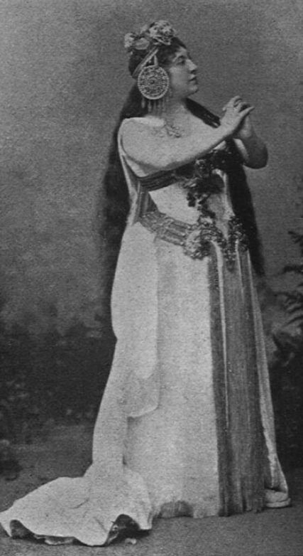 Blanche Deschamps-Jéhin in Samson et Dalila 1892 Unknown